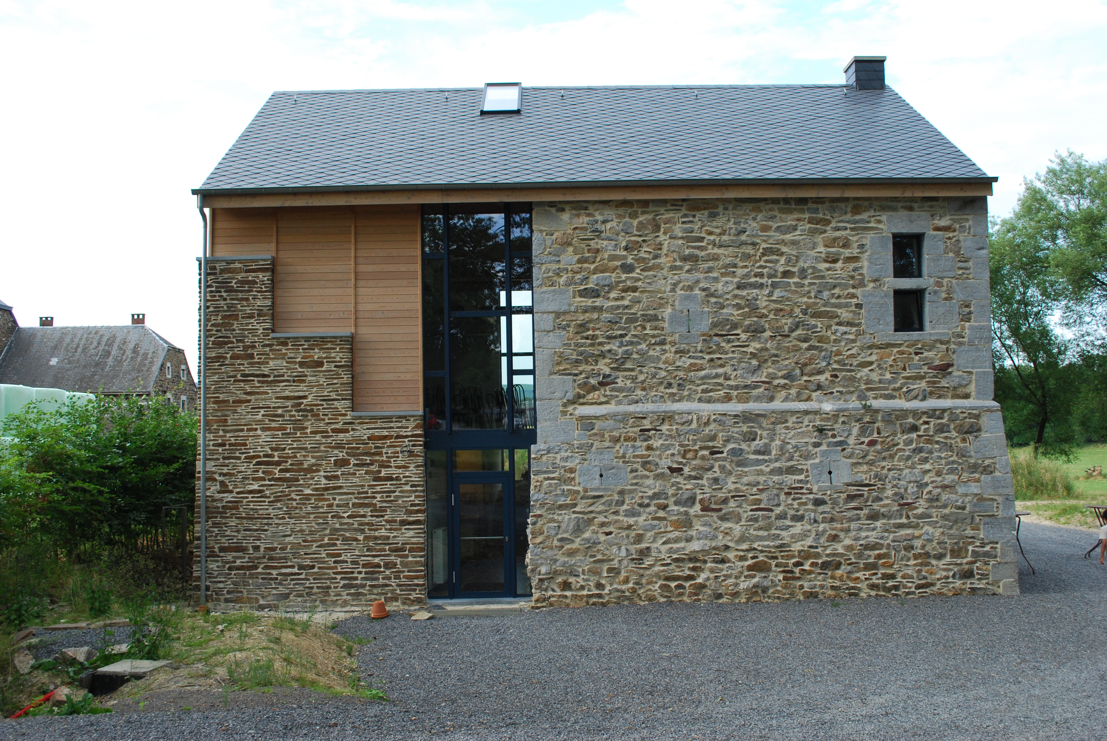 Le château de Rahier (Stoumont).